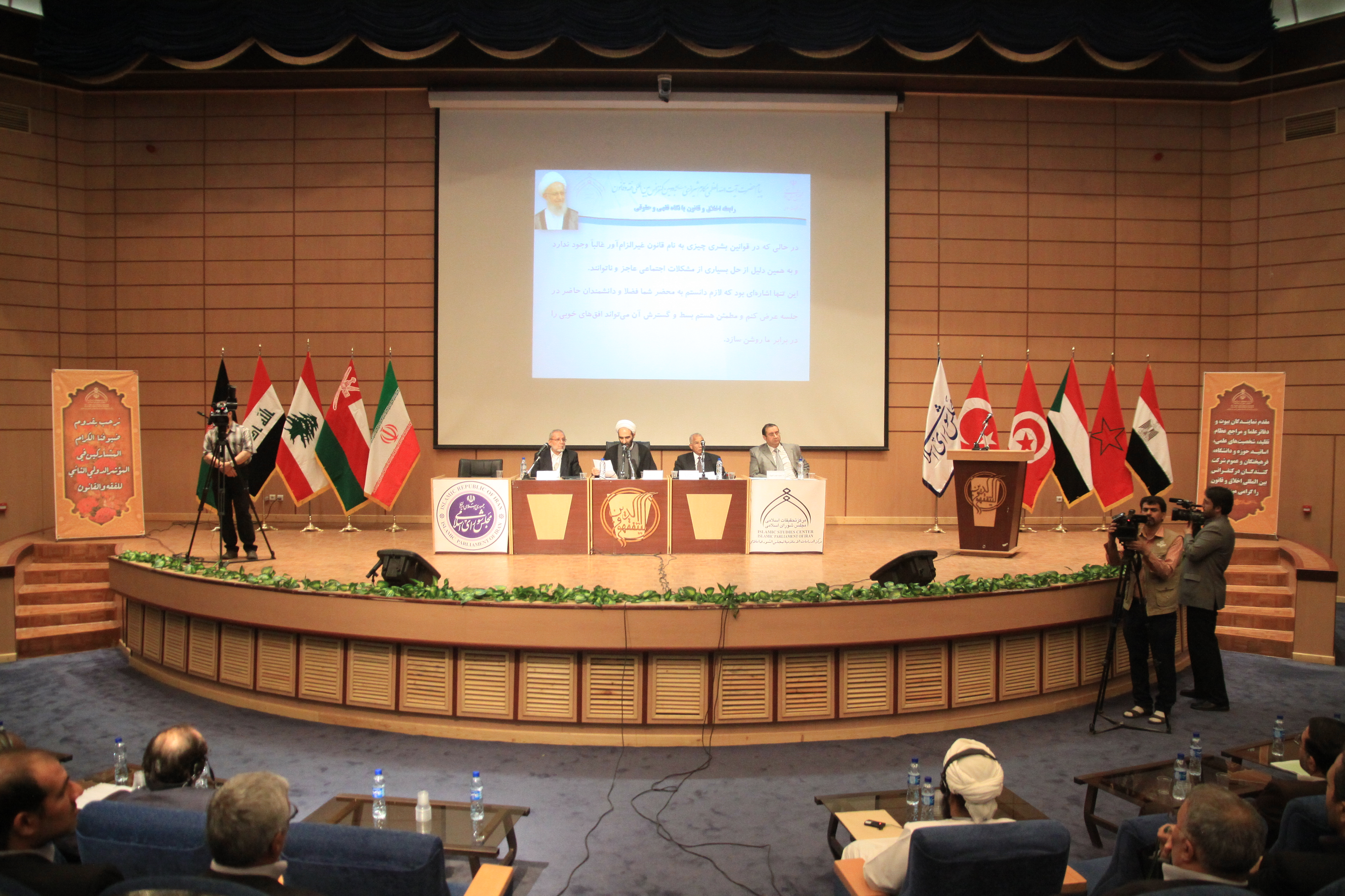 الجلسة الافتتاحية للدورة الثانية من المؤتمر الدولي للفقه والقانون